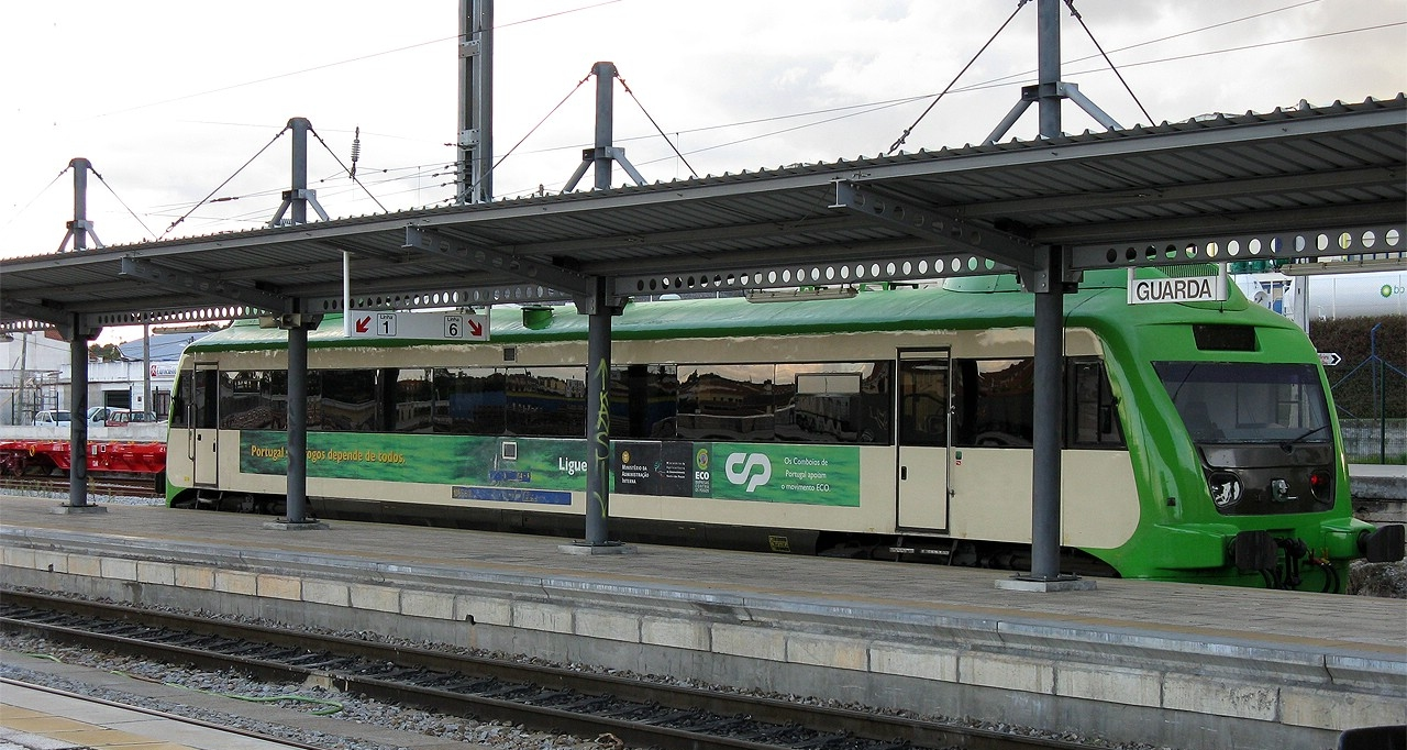 É o que diz a 364 na Guarda